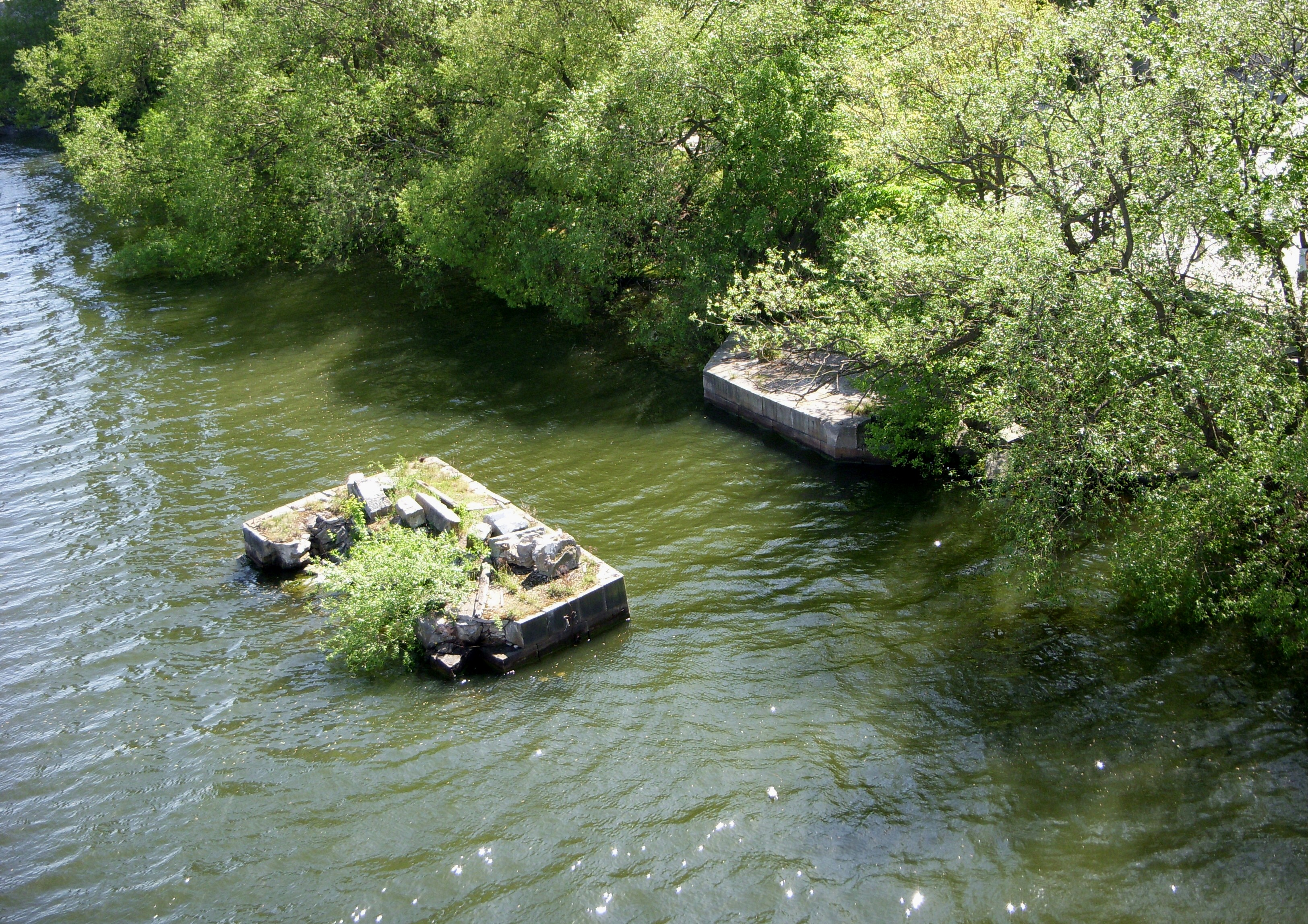 Liljeholmebron i Stockholm, gamla brofundamentet